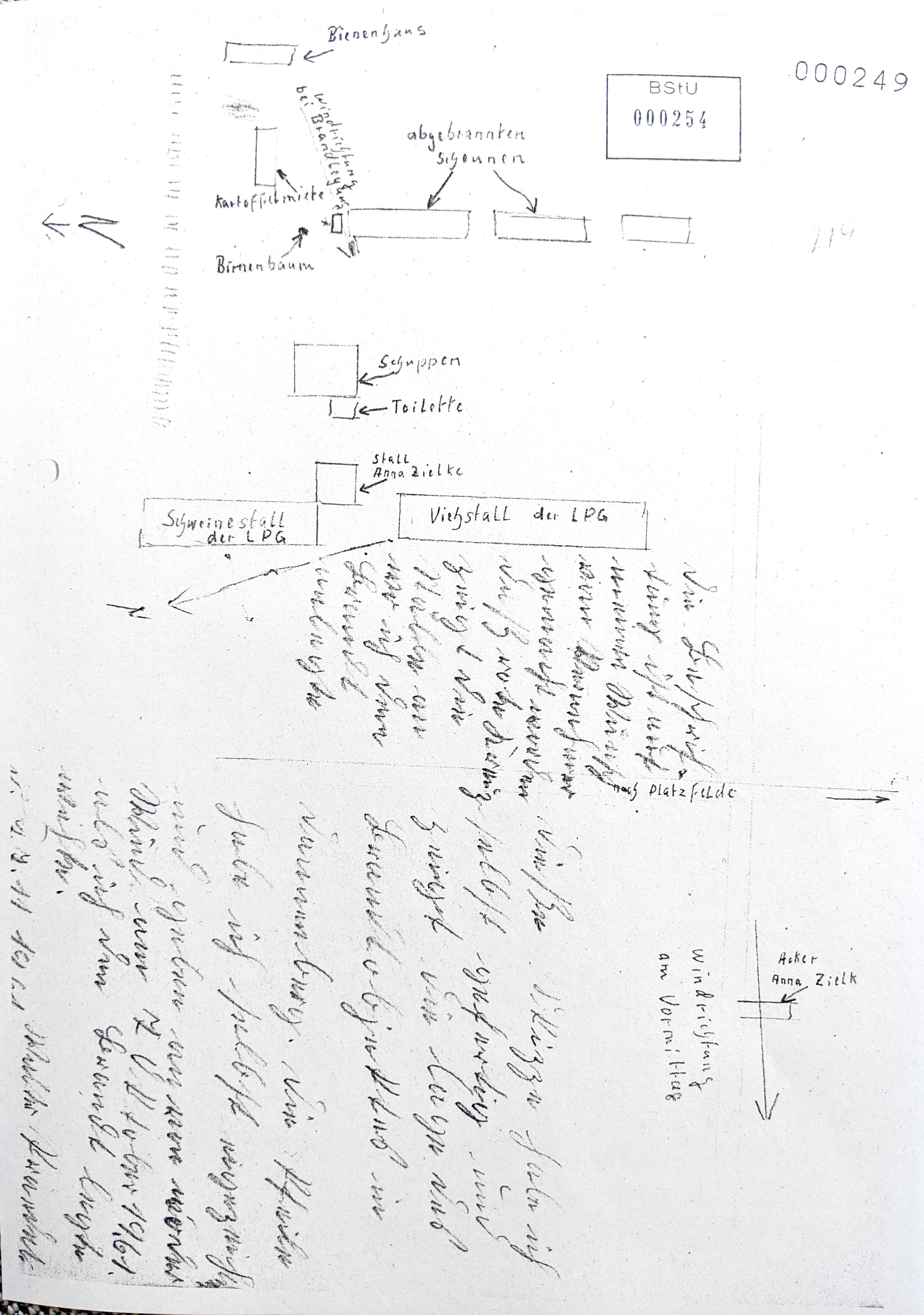 Walter Pradel – Tatort-Skizze 1961